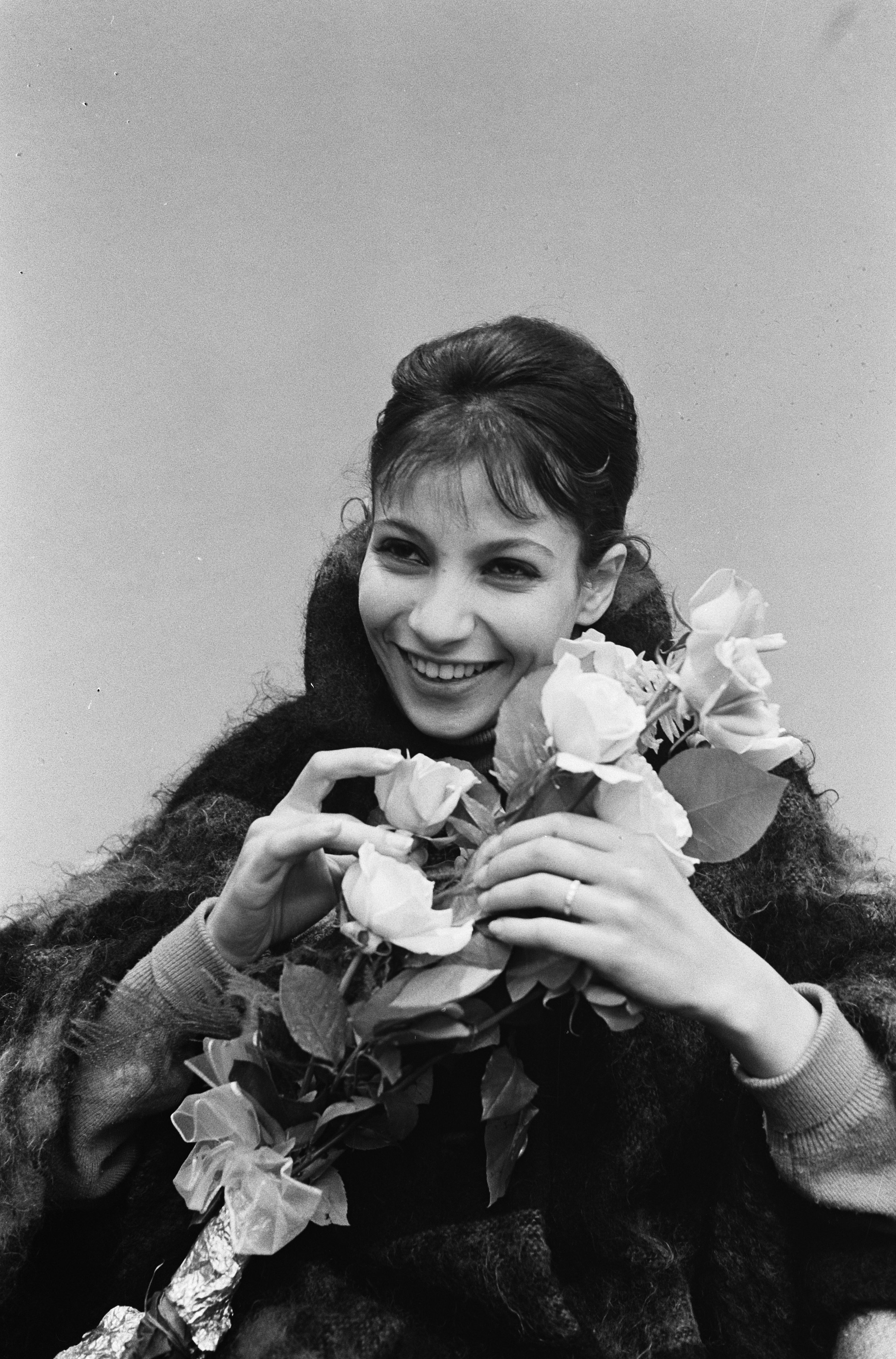 Collectie / Archief : Fotocollectie Anefo Reportage / Serie : [ onbekend ] Beschrijving : Esther Ofarim (zangeres) in Nederland voor optreden Grand Gala du Disque Datum : 10 oktober 1963 Trefwoorden : Optredens, zangeressen Persoonsnaam : Esther Ofarim Fotograaf : Pot, Harry / Anefo Auteursrechthebbende : Nationaal Archief Materiaalsoort : Negatief (zwart/wit) Nummer archiefinventaris : bekijk toegang 2.24.01.05 Bestanddeelnummer : 915-6195